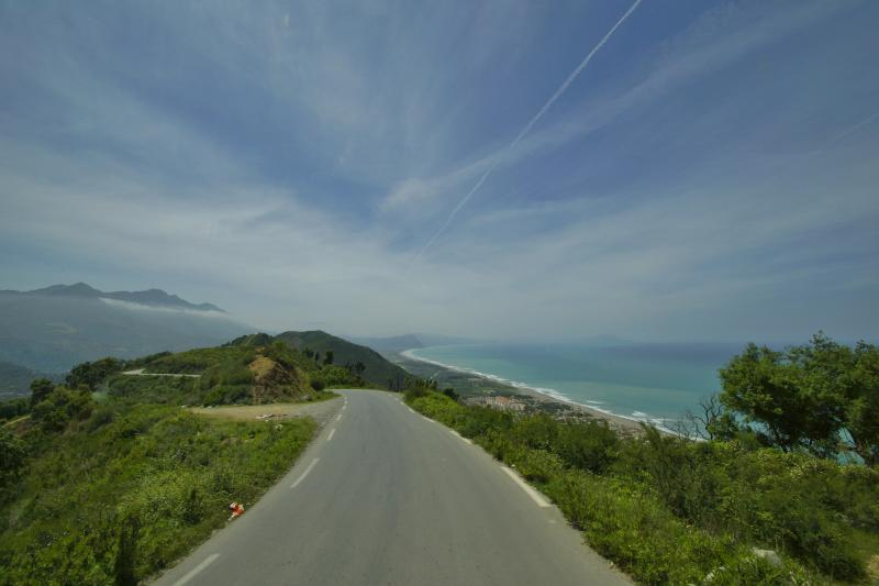 Route le long du Golf de Béjaïa